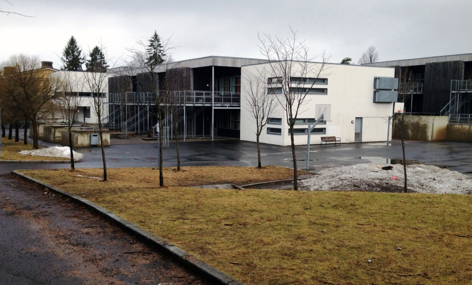 Kastellet skole, Oslo